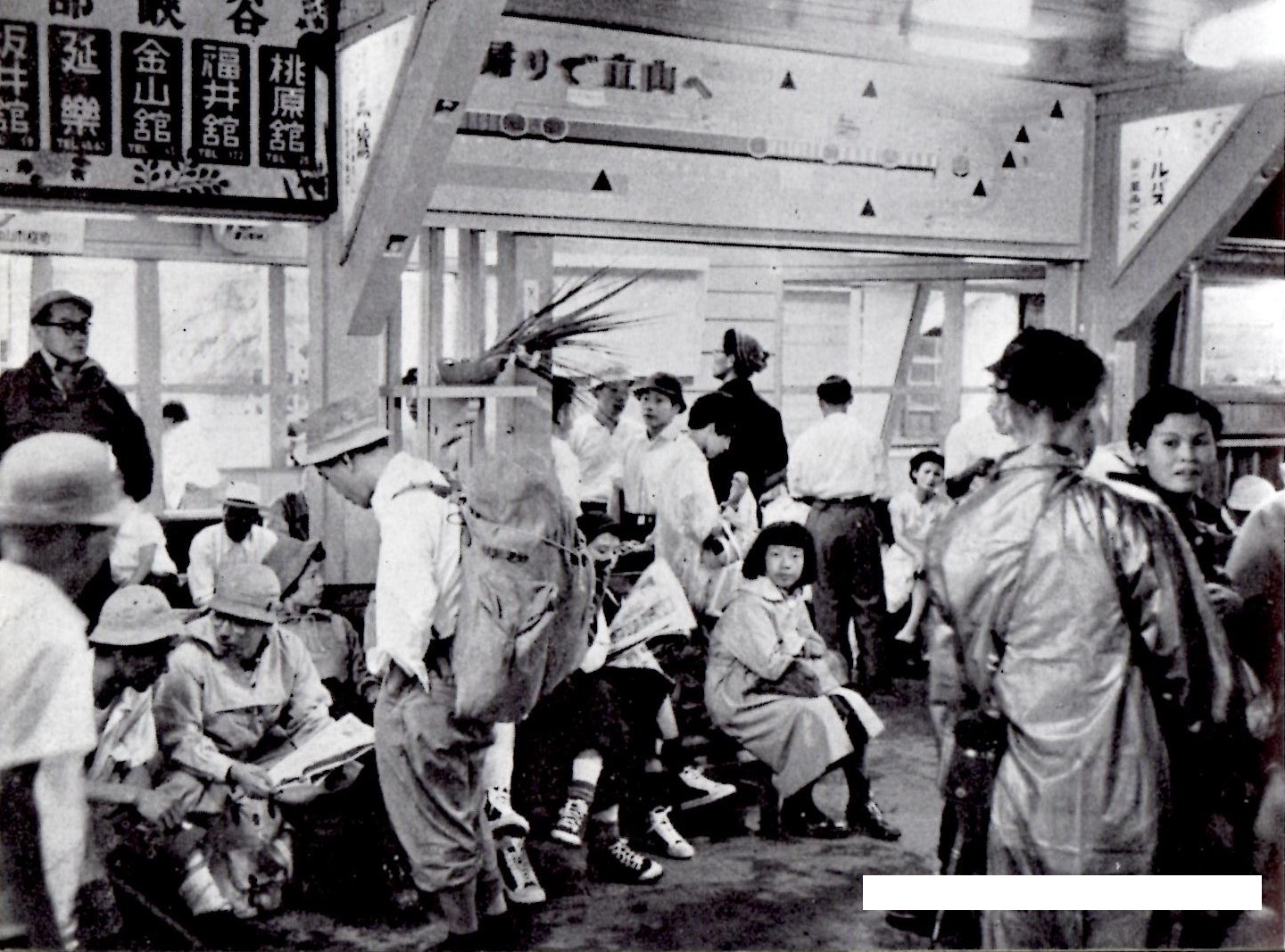 昭和31年の電鉄富山駅